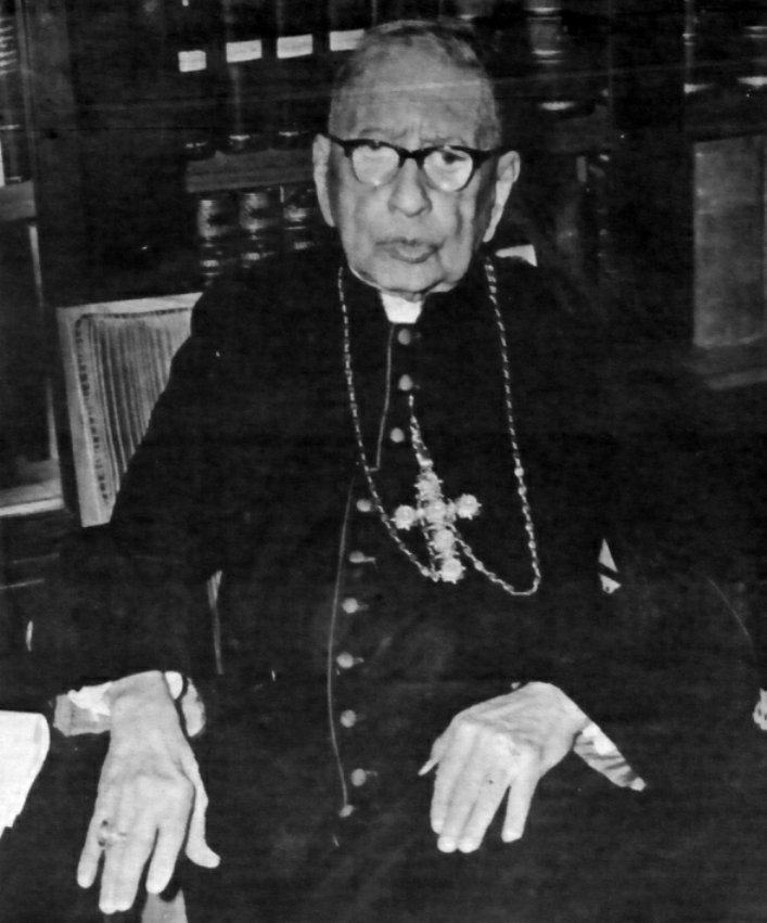 Emilio Lissón Chaves C.M. (1872 - 1961),sacerdote vicentino y XXVII Arzobispo de Lima.